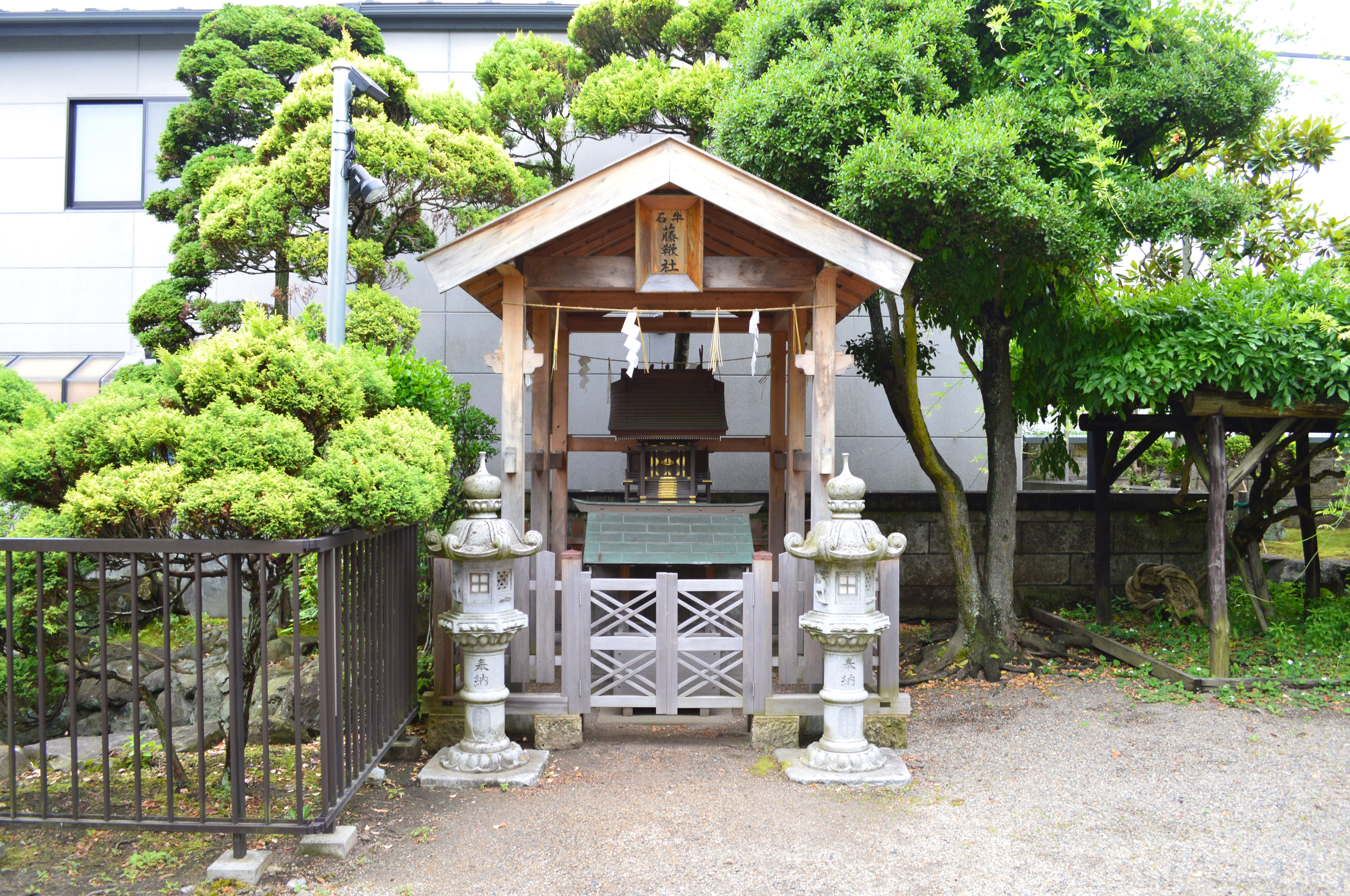 御釜神社 (塩竈市) 境内藤鞭社